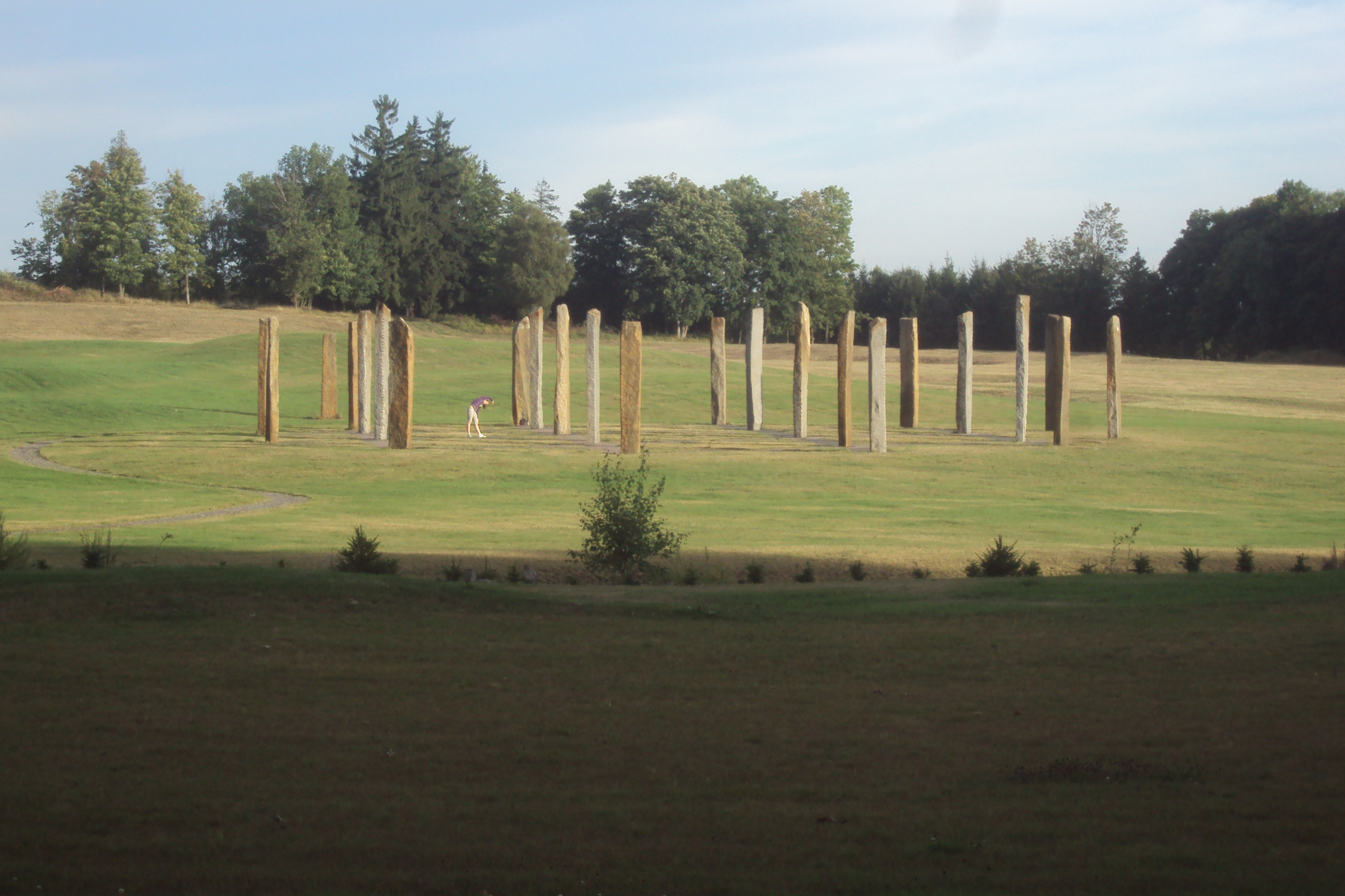 Pod kopcem s rozhlednou Dymník je rekreační areál a tato skupina kamenů